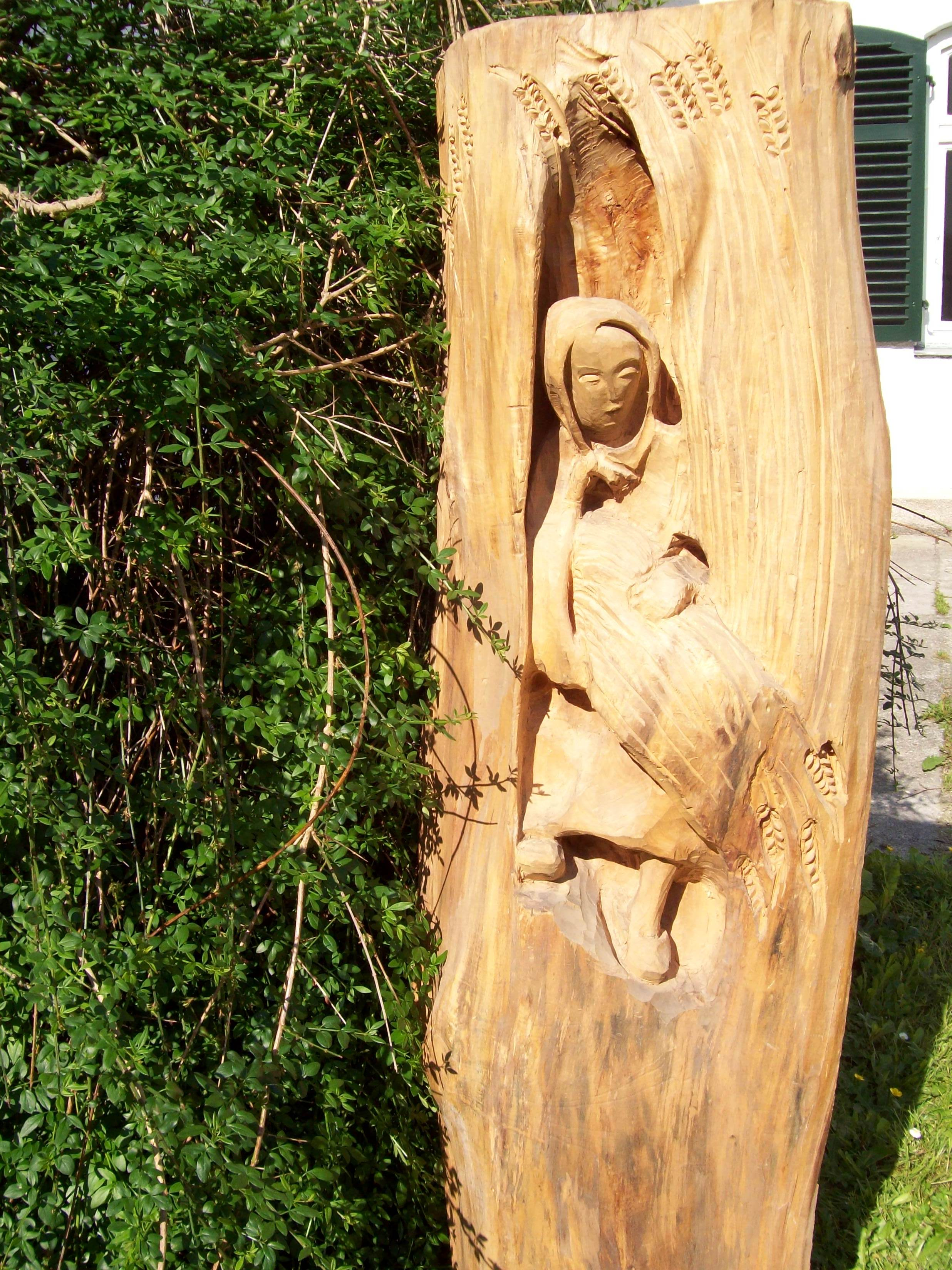 Bernardine Webers "Frau im Ährenfeld" symbolisiert den Augenblick des Innehaltens nach getaner Arbeit.